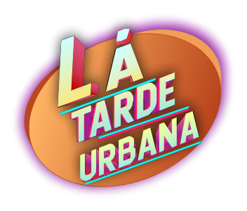 Este es el logo del Programa de radio La Tarde Urbana.